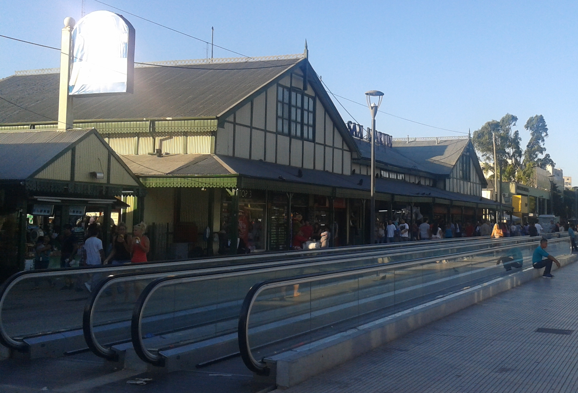 Vista hacia el este